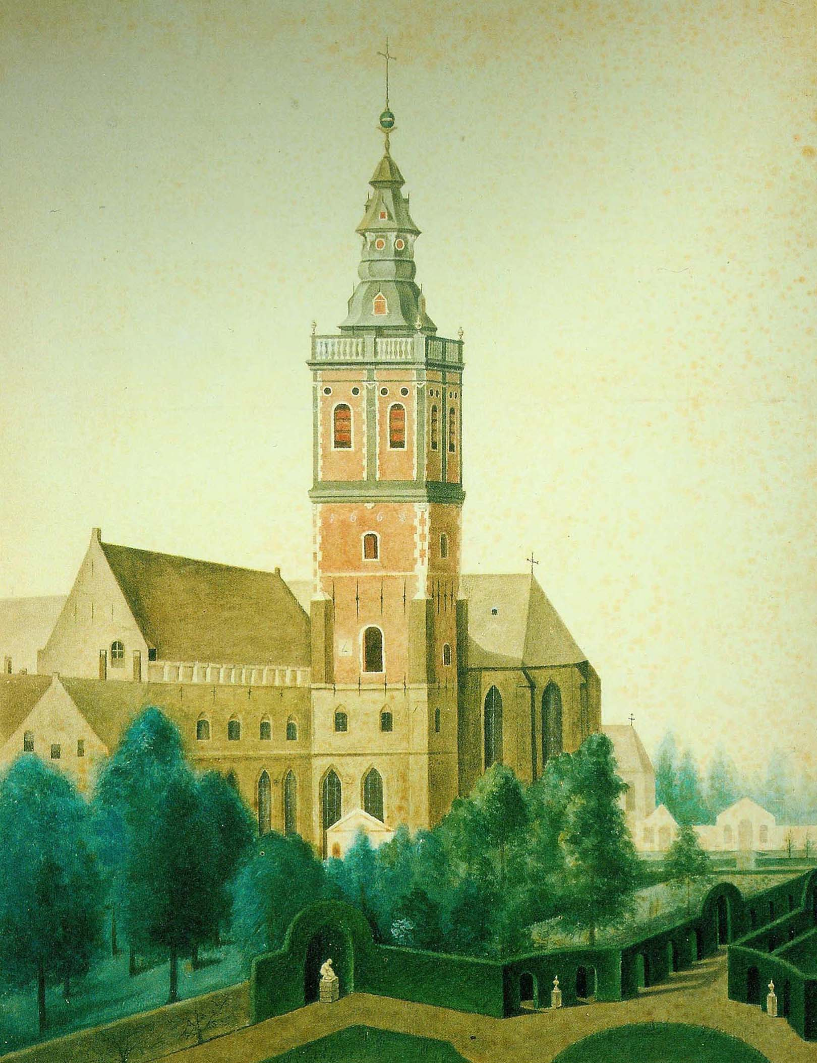 De Eekhoutabdij eind 18de eeuw - Brugge - België